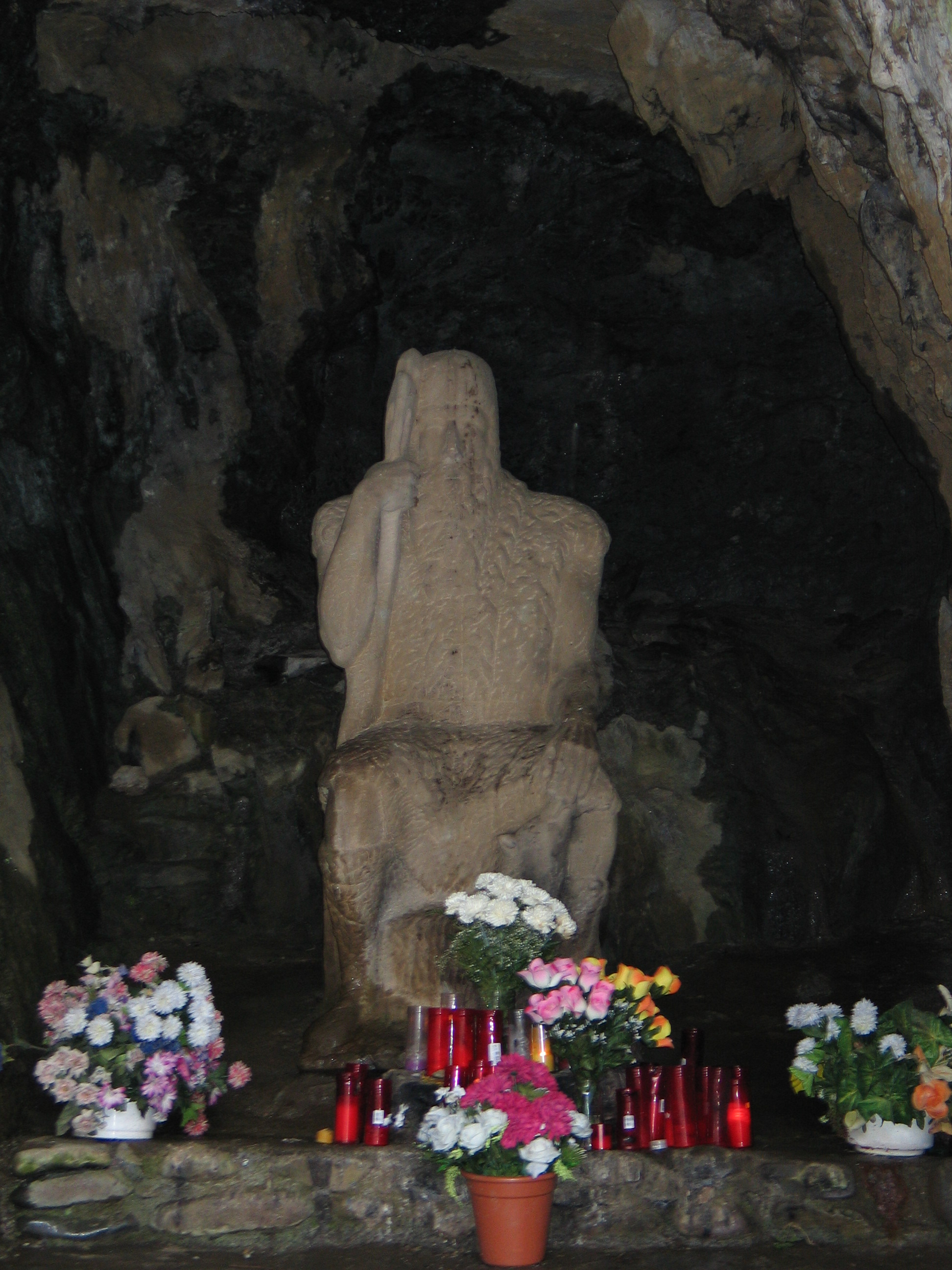 Igantziko San Juan Xar